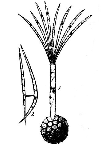 Germanta teliosporo